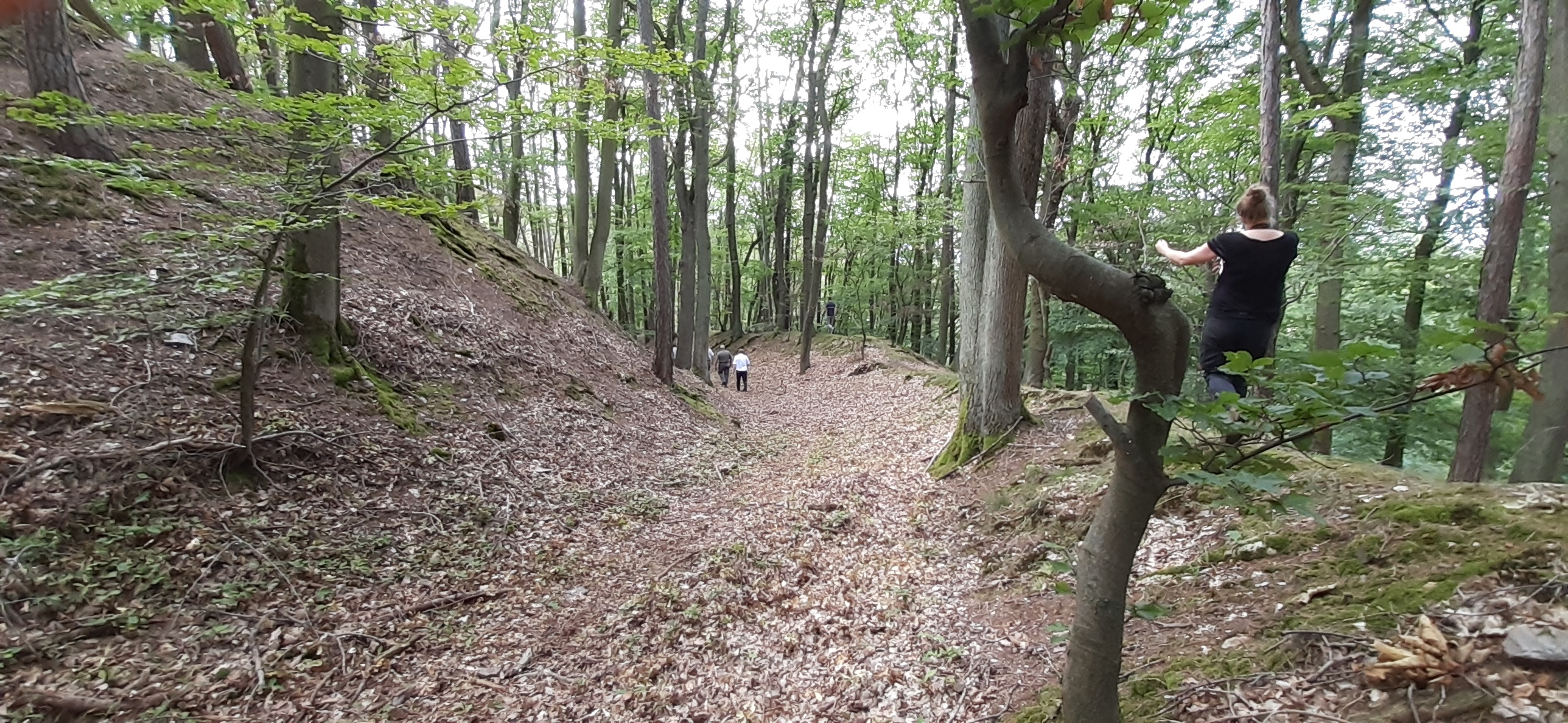 Rannenburg: Begehung der Rannenburg. Westseite des Wall-Grabensystems. Links: Mittlere Vorburg